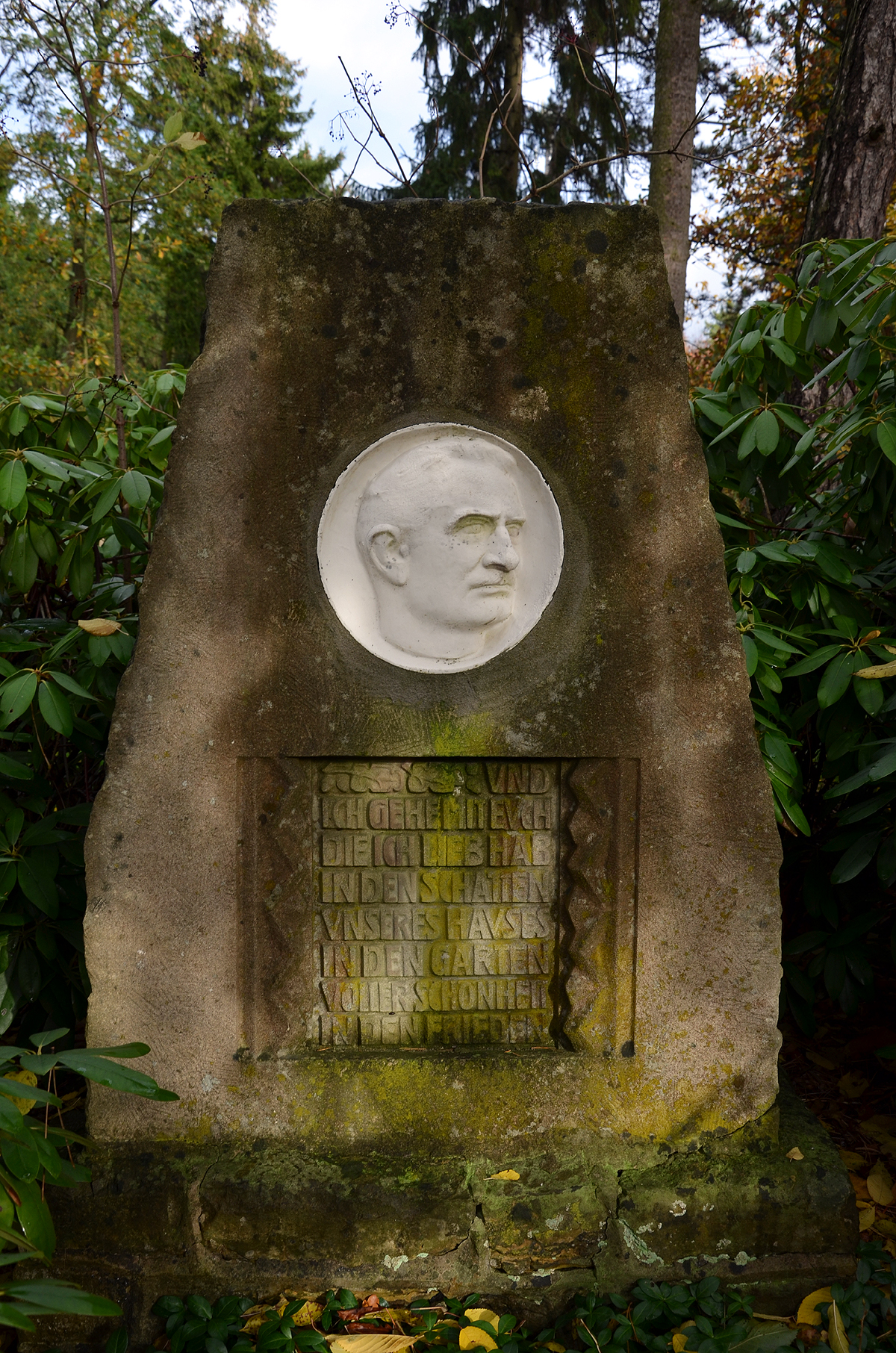 Gedenkstein (eines "hier" noch unidentifizierten Künstlers) mit einem Porträtmedaillon für den hannoverschen Möbelfabrikanten und Freimaurer Hermann Rexhausen. Der Stein für den Bauherren des - heutigen - Kulturdenkmals Hermannshof in Völksen trägt eine Inschrift mit einem Gedicht frei nach Otto Julius Bierbaum: „Und ich gehe mit Euch, die ich lieb hab, in den Schatten unseres Hauses, in den Garten voller Schönheit, in den Frieden“ ...